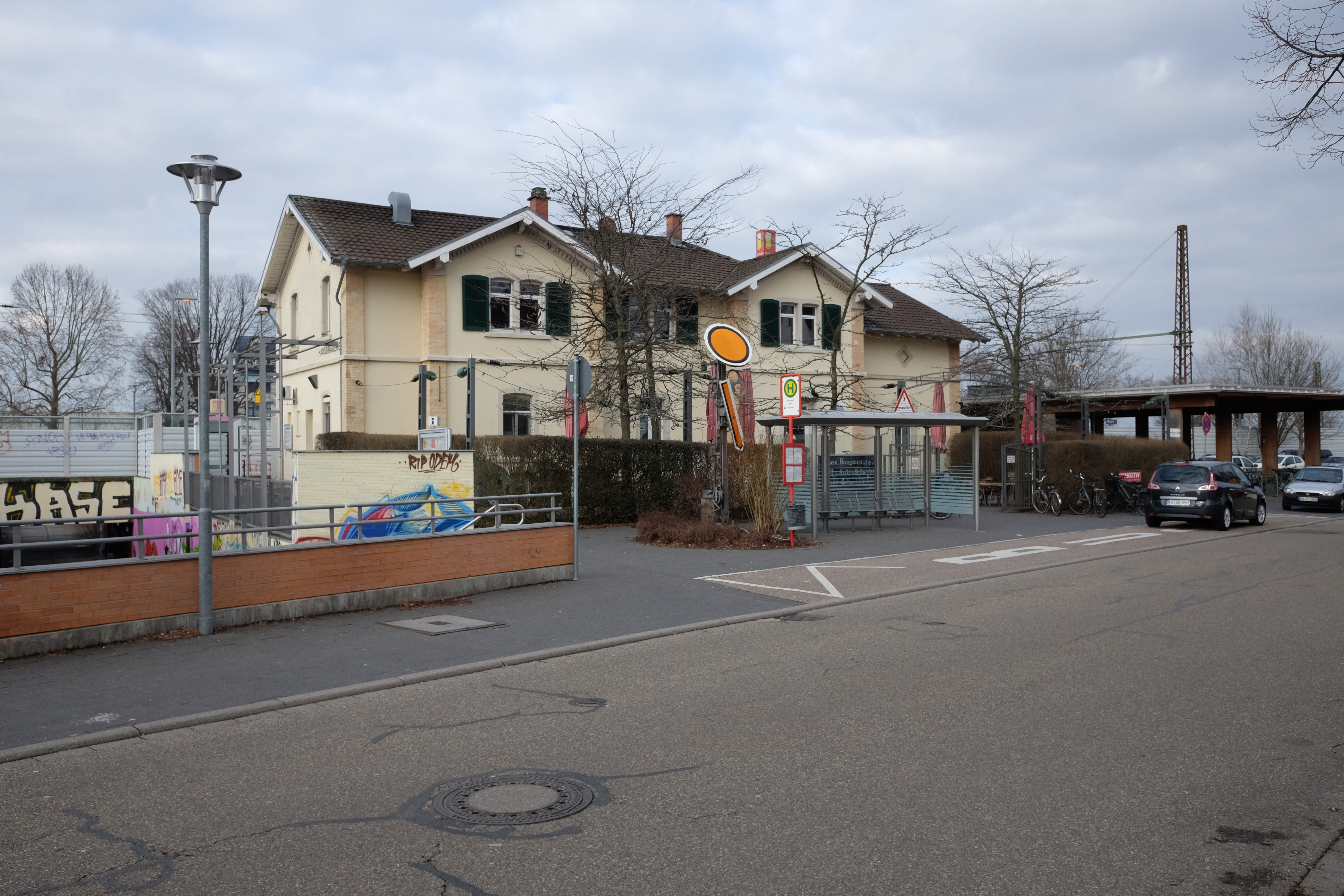 Der Bahnhof von Malsch im Landkreis Karlsruhe.